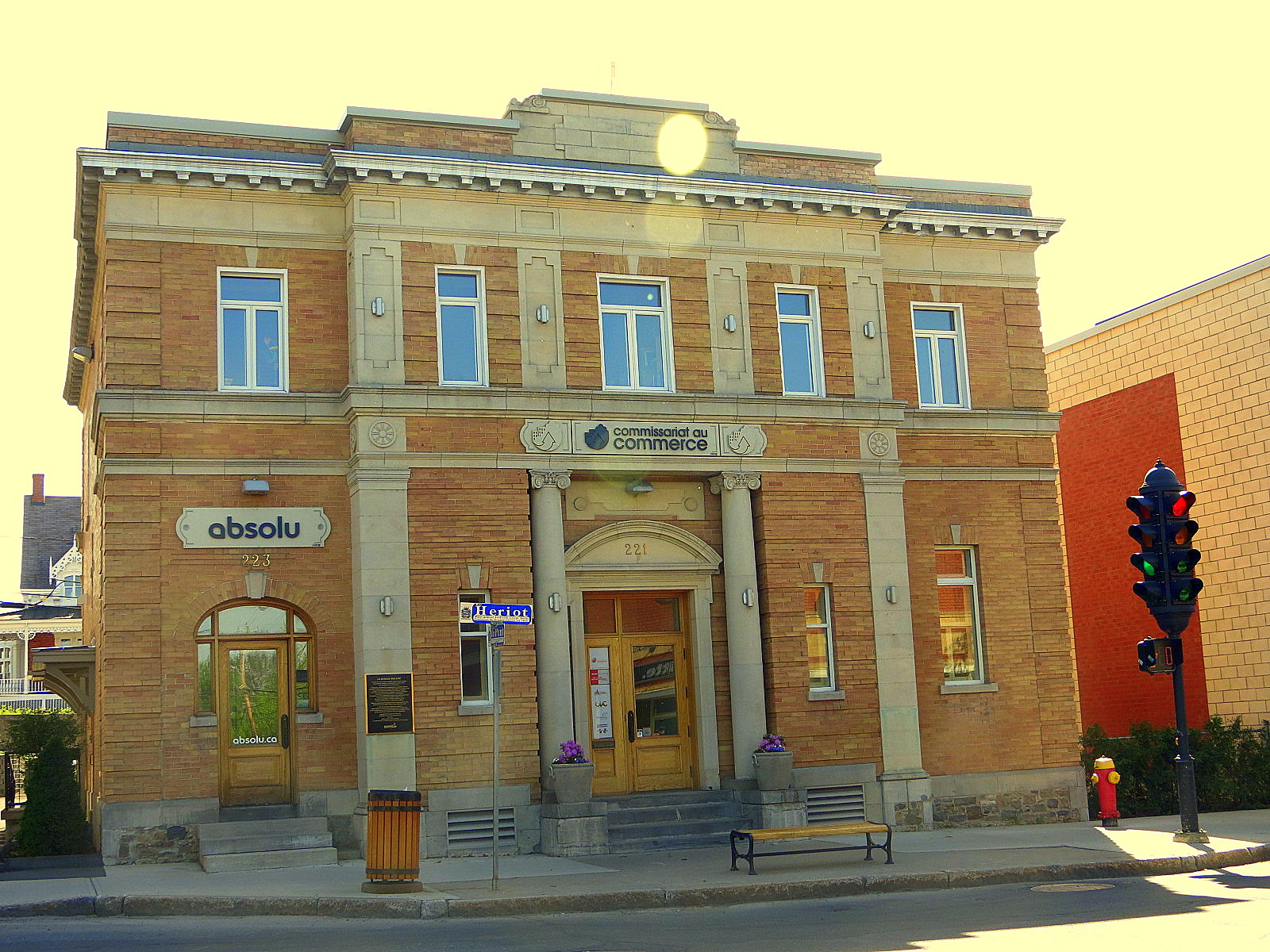 Banque de Montréal, 221, rue Heriot, Drummondville (Canada). (Protection IP cité. Voir la liste des lieux patrimoniaux du Centre-du-Québec pour plus de détails).